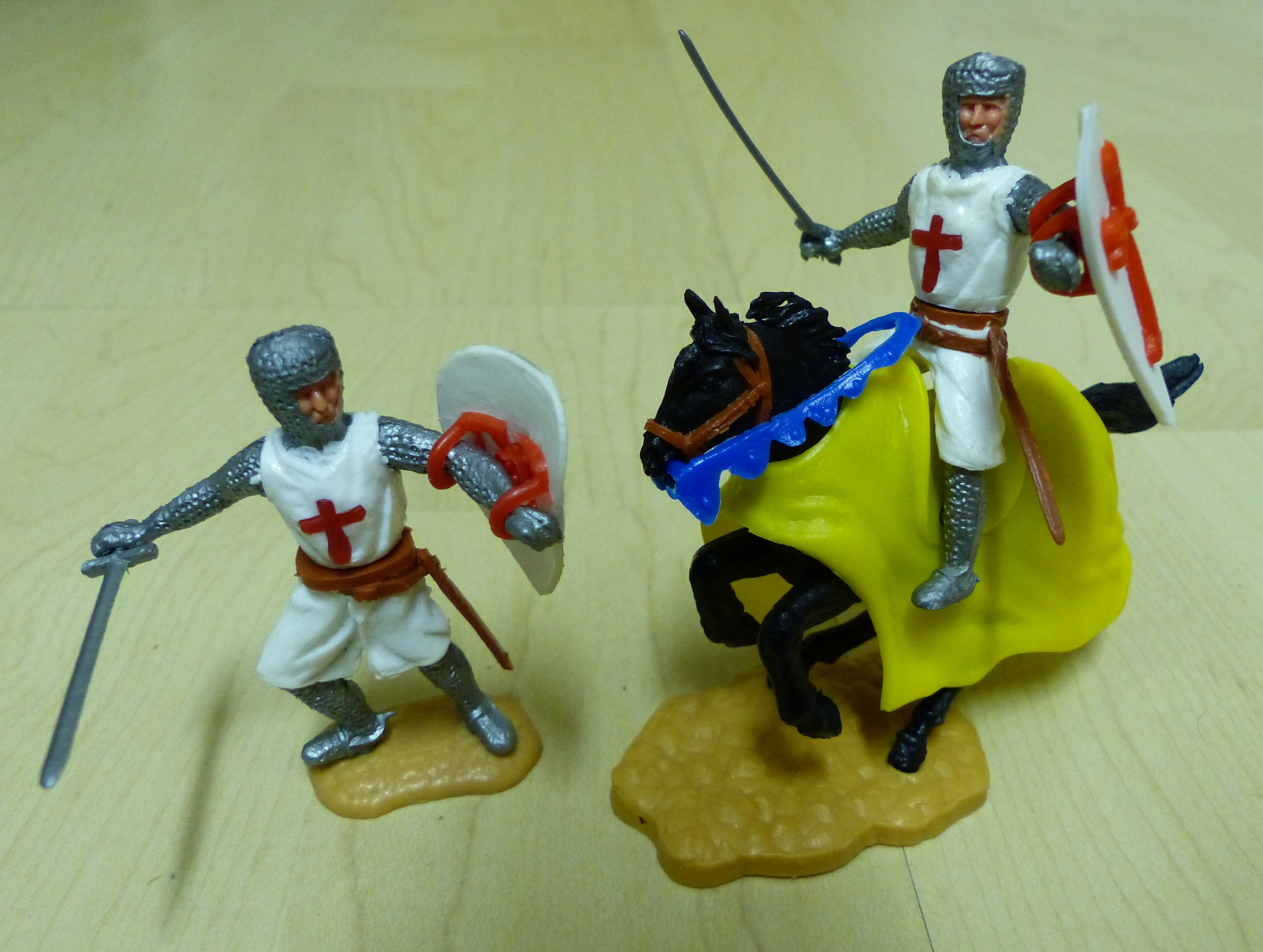 Kunststofffigur der Firma Timpo Toys